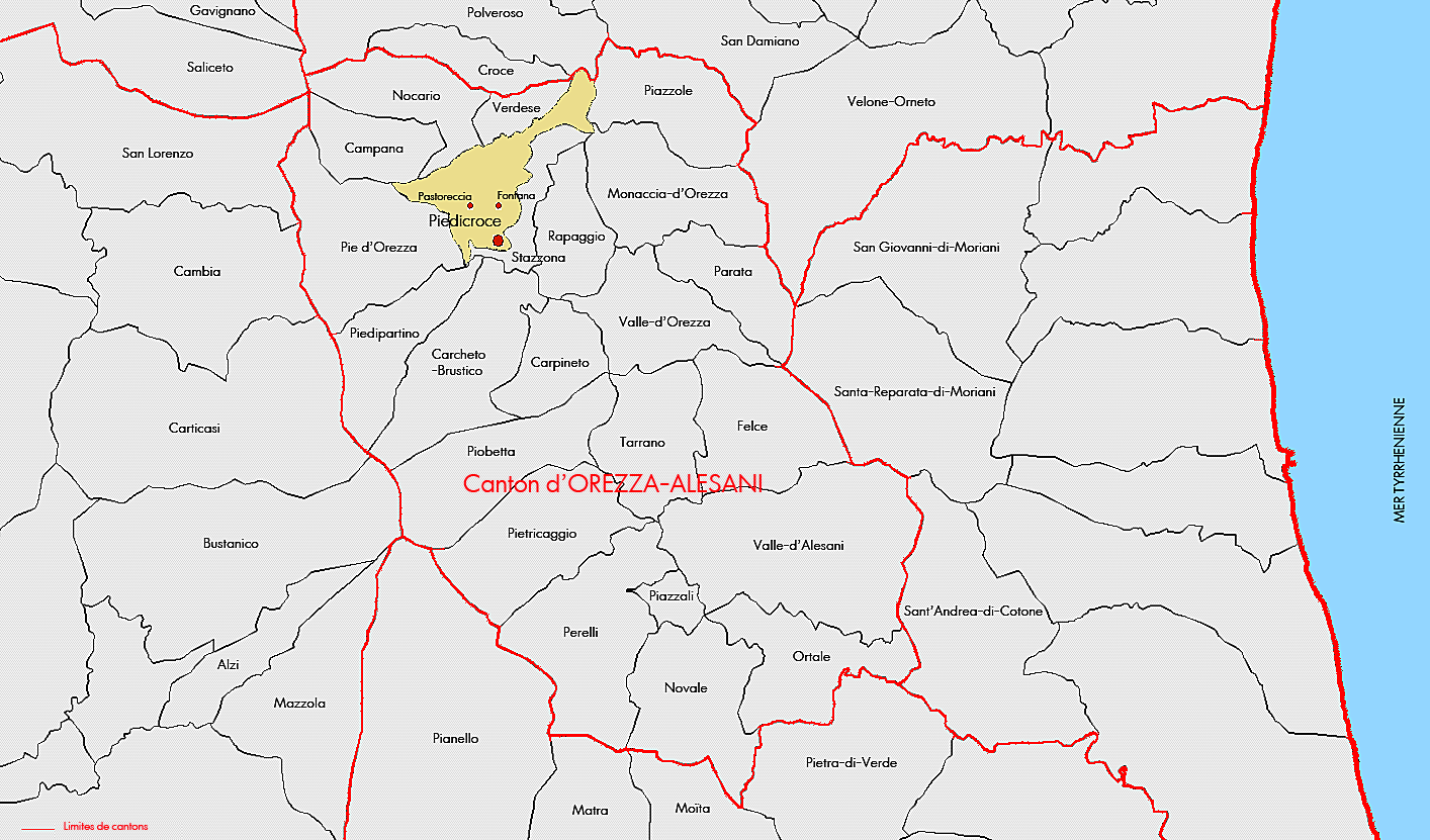 Carte du canton d'Orezza-Alesani (Haute-Corse)